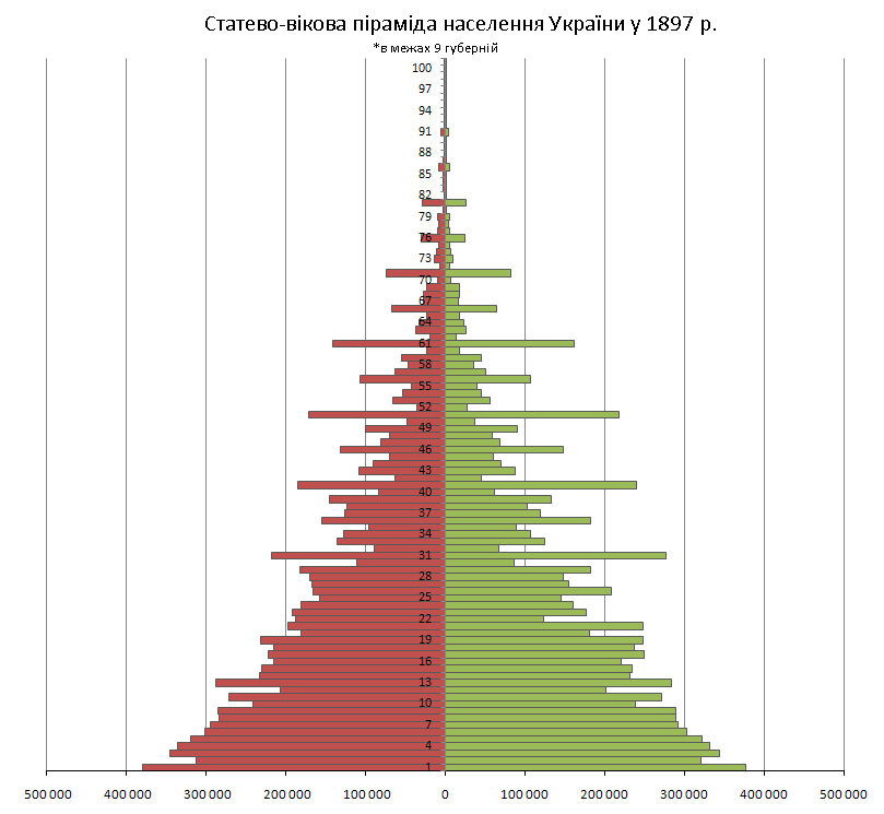 Вікова піраміда населення України у 1897 р. (9 губерній) / Population pyramid of Ukraine in 1897 (9 governorates)